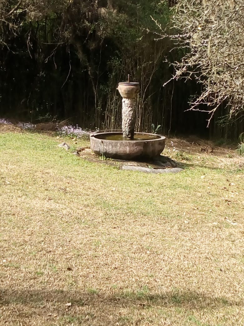 Fuente ubicada en el predio de la Capilla de la Comunidad El Arca, lugar mas conocido como " Los Dos Ermitaños"